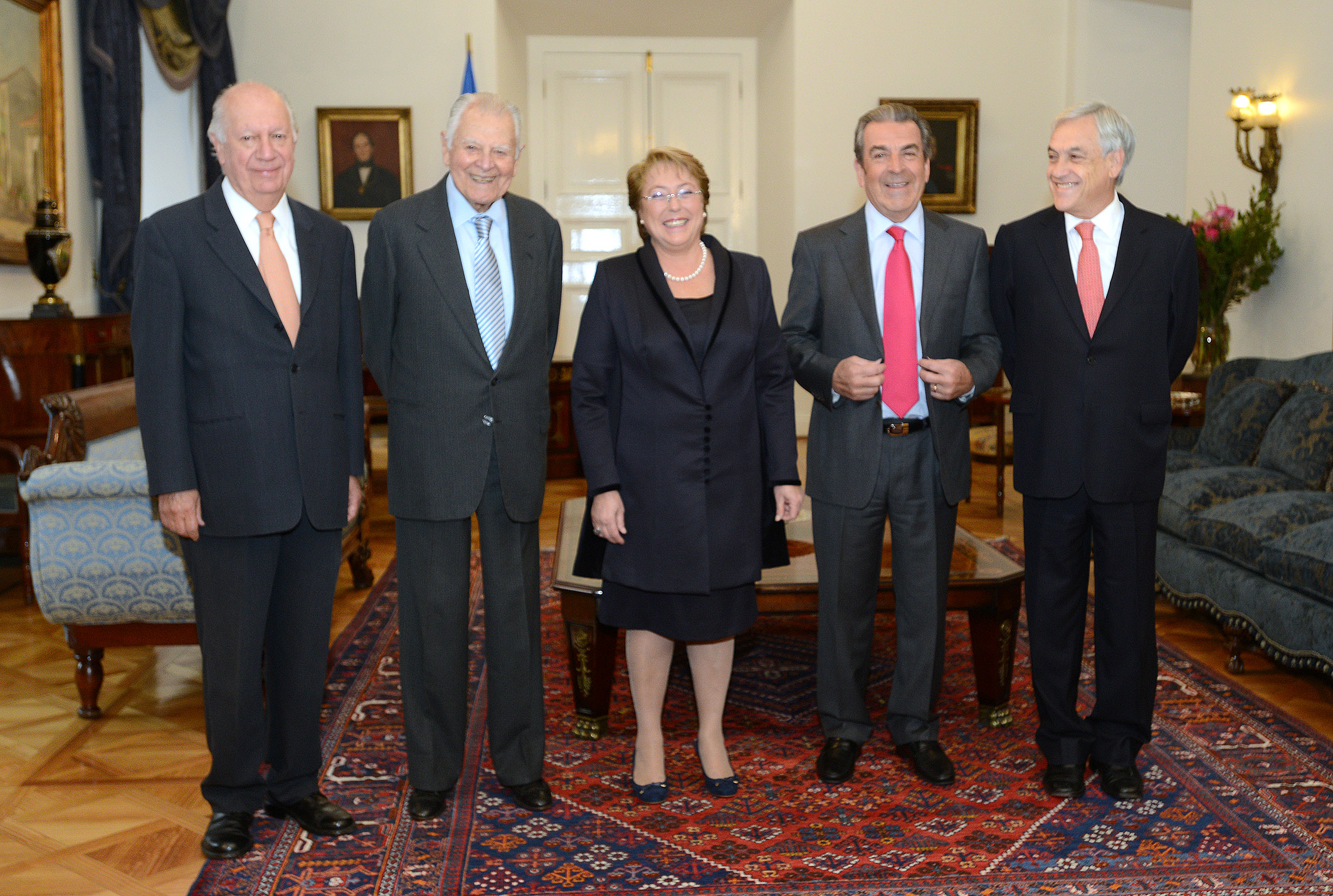 Presidenta recibió a los ex Presidentes para abordar demanda marítima de Bolivia ante La Haya.